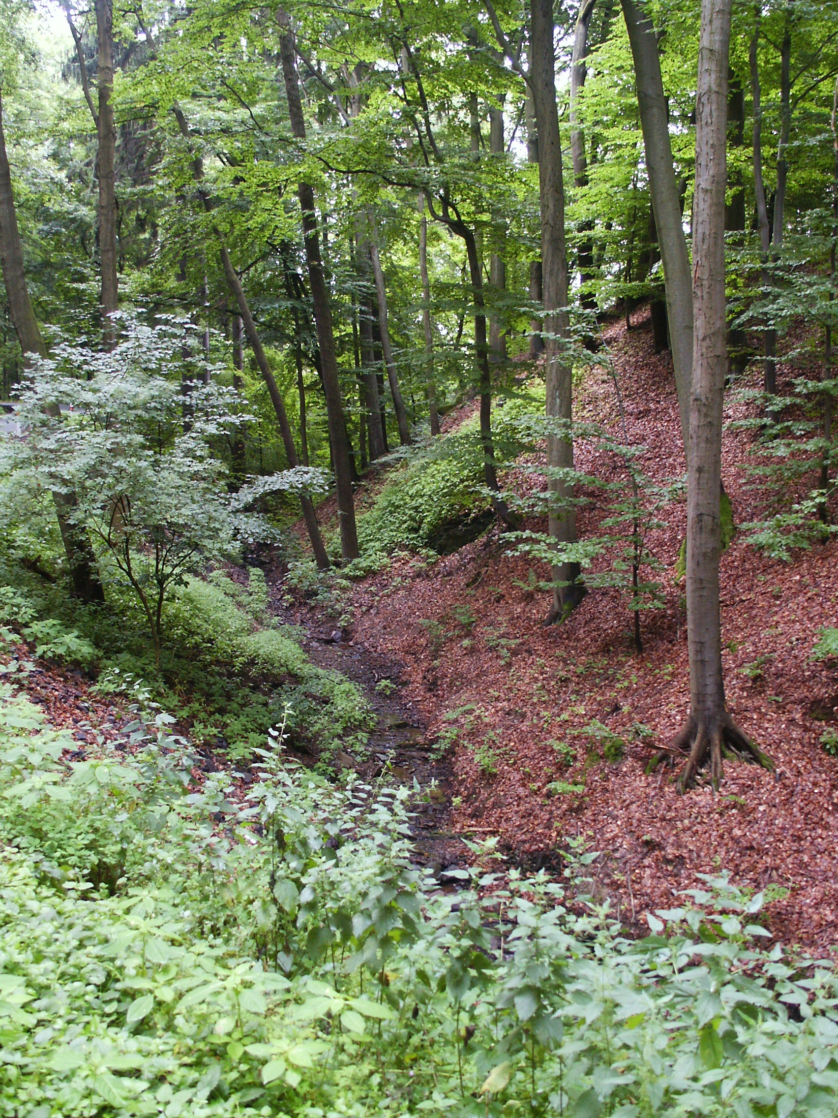 Stav (přírodní památka) - údolí potoka